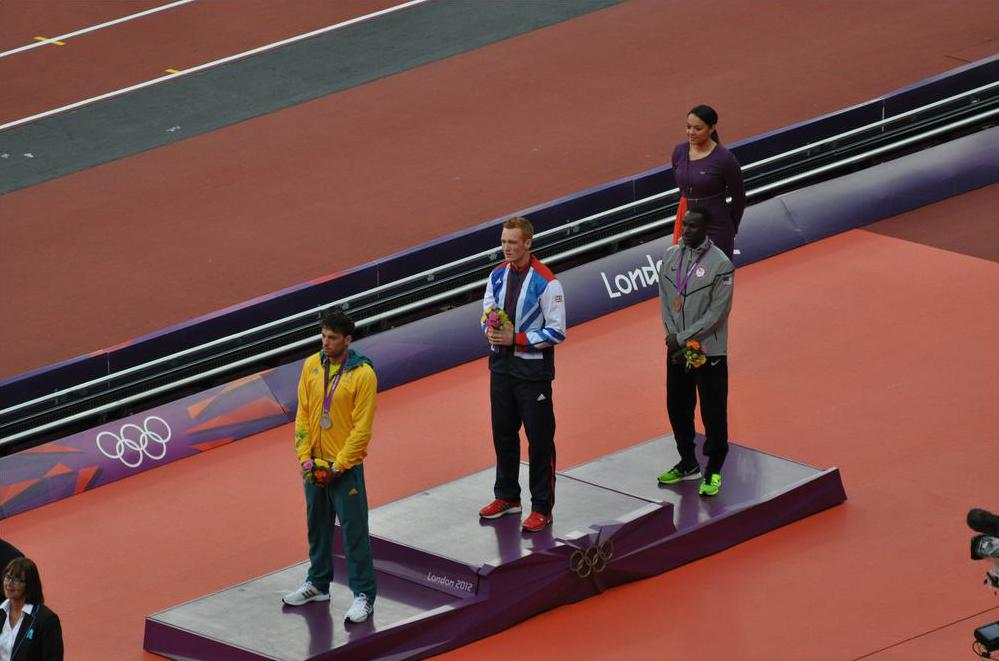 Mens long jump medal ceremony